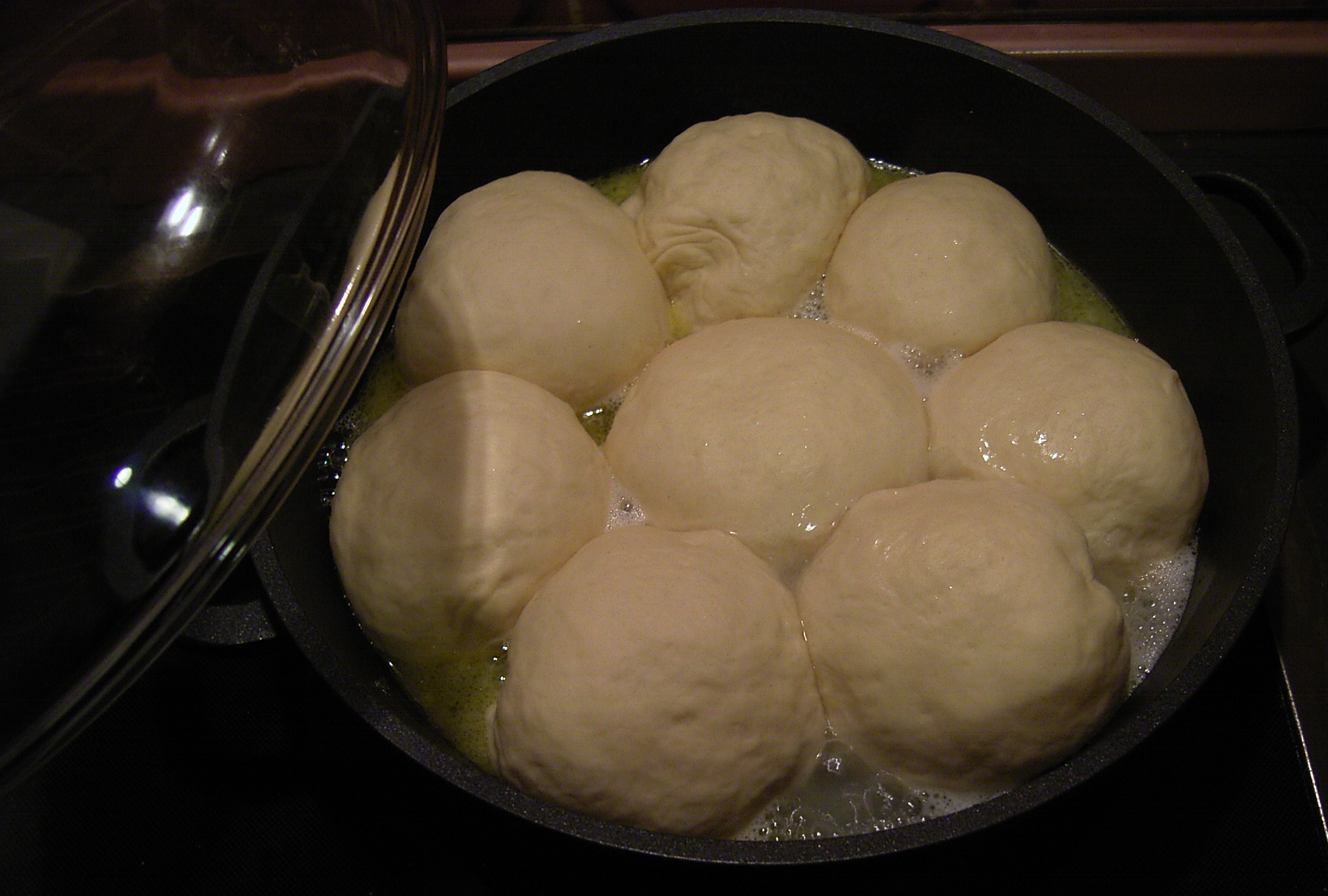 Dampfnudeln